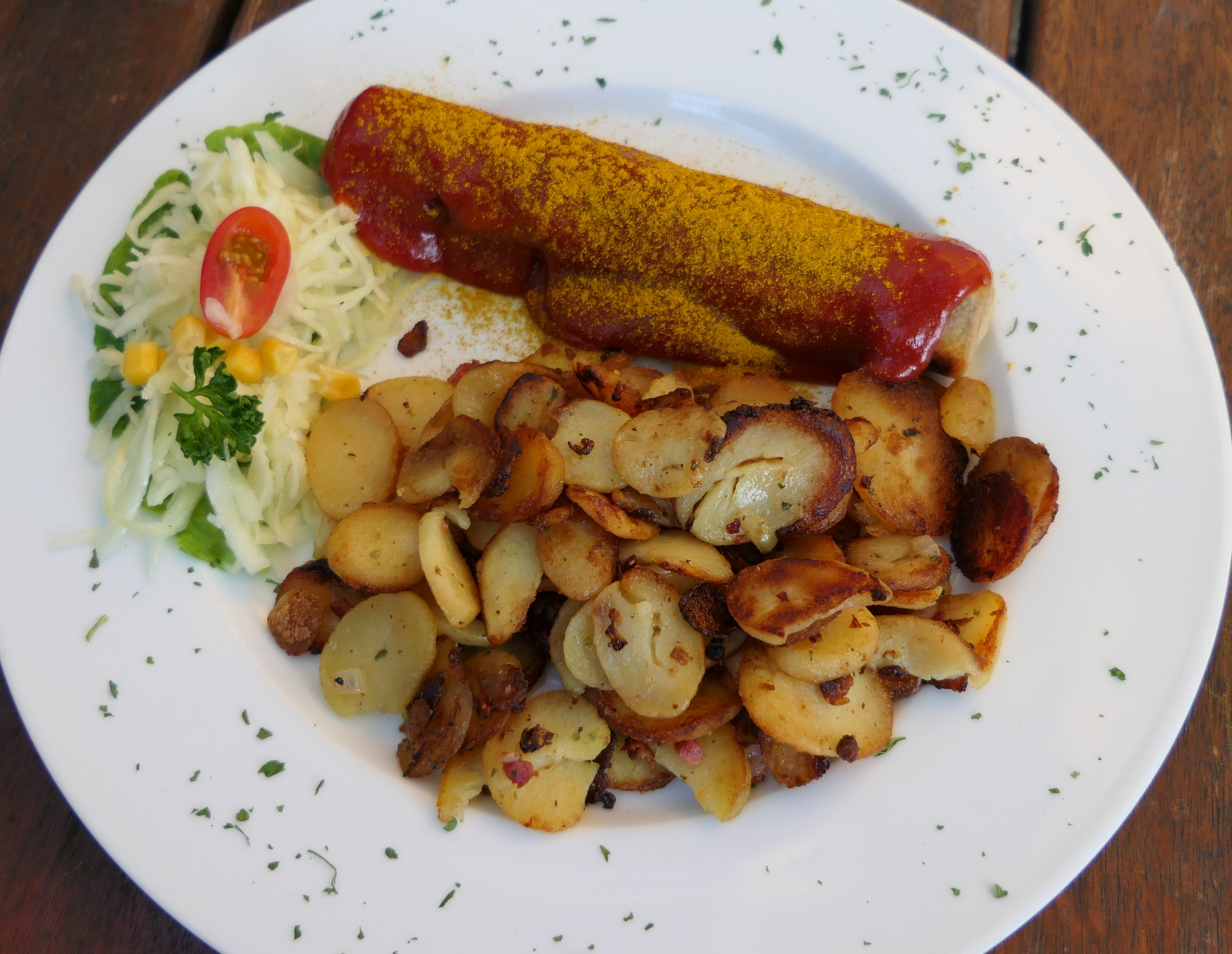 Currywurst mit Bratkartoffeln, Kneipe Metzer Eck, Prenzlauer Berg, Berlin